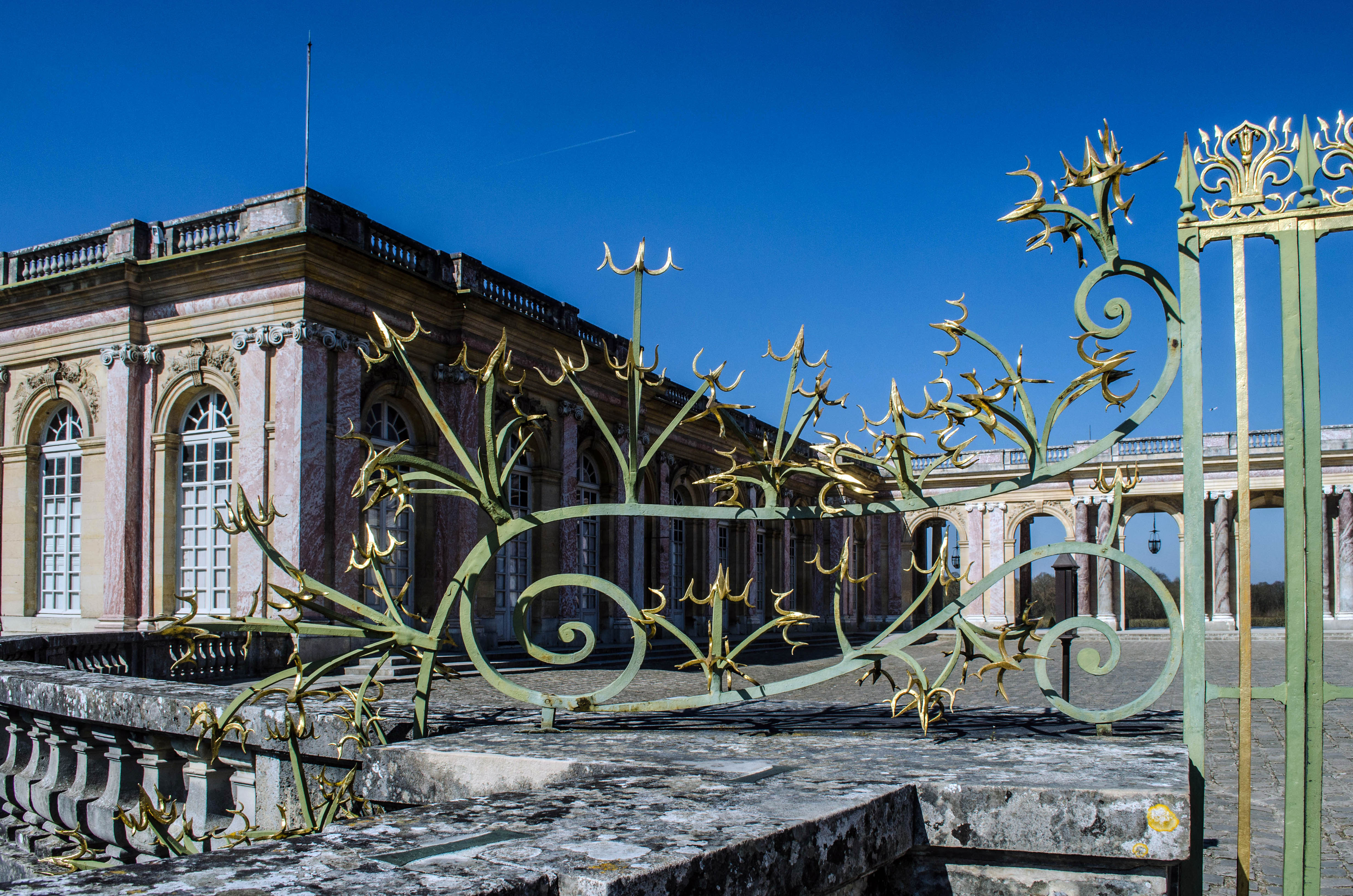 Palais du Grand Trianon, à Versailles (France) : artichaut de la grille d’entrée.